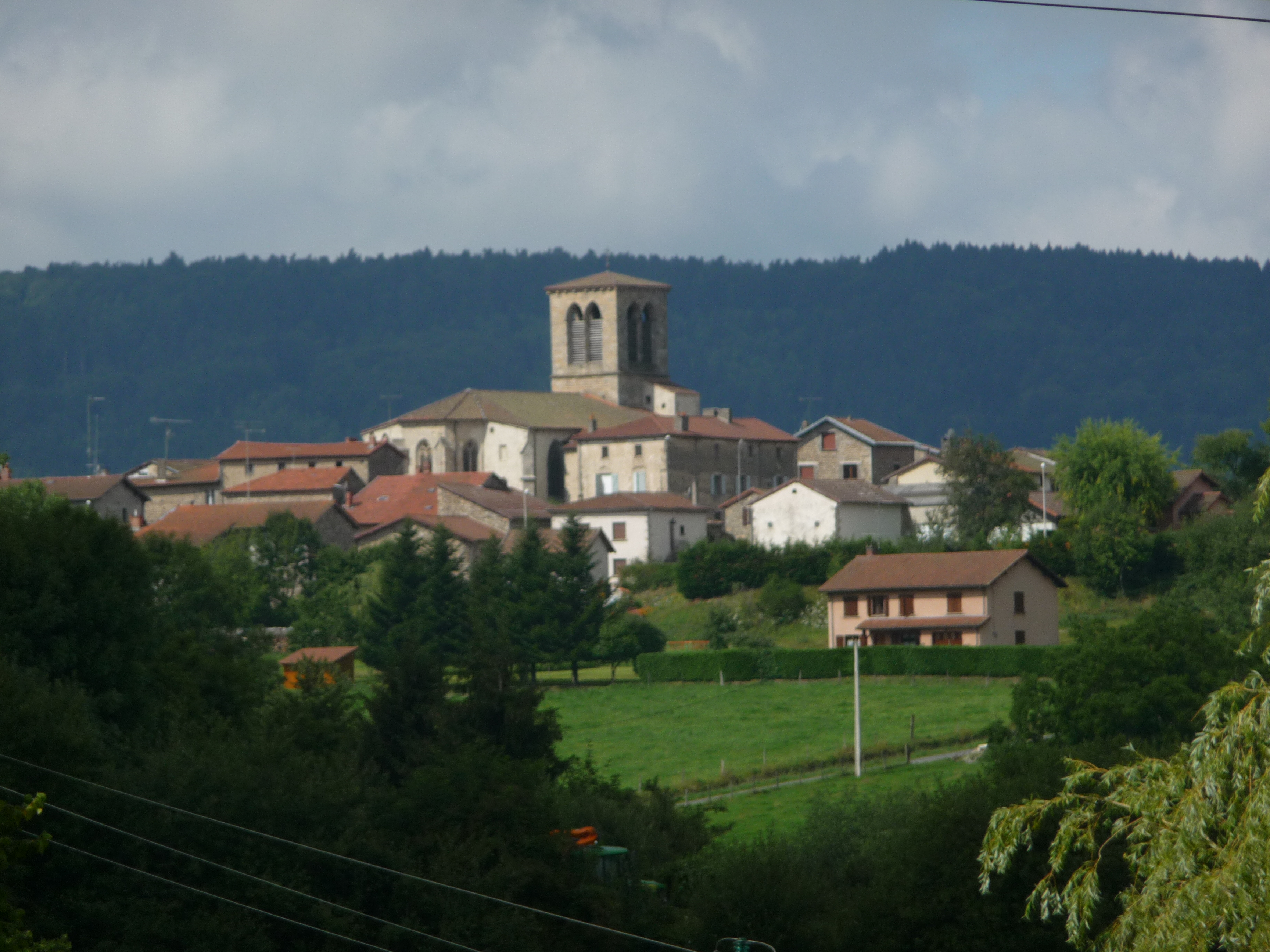 Vue sur le village de St-Amant-Roche-Savine.